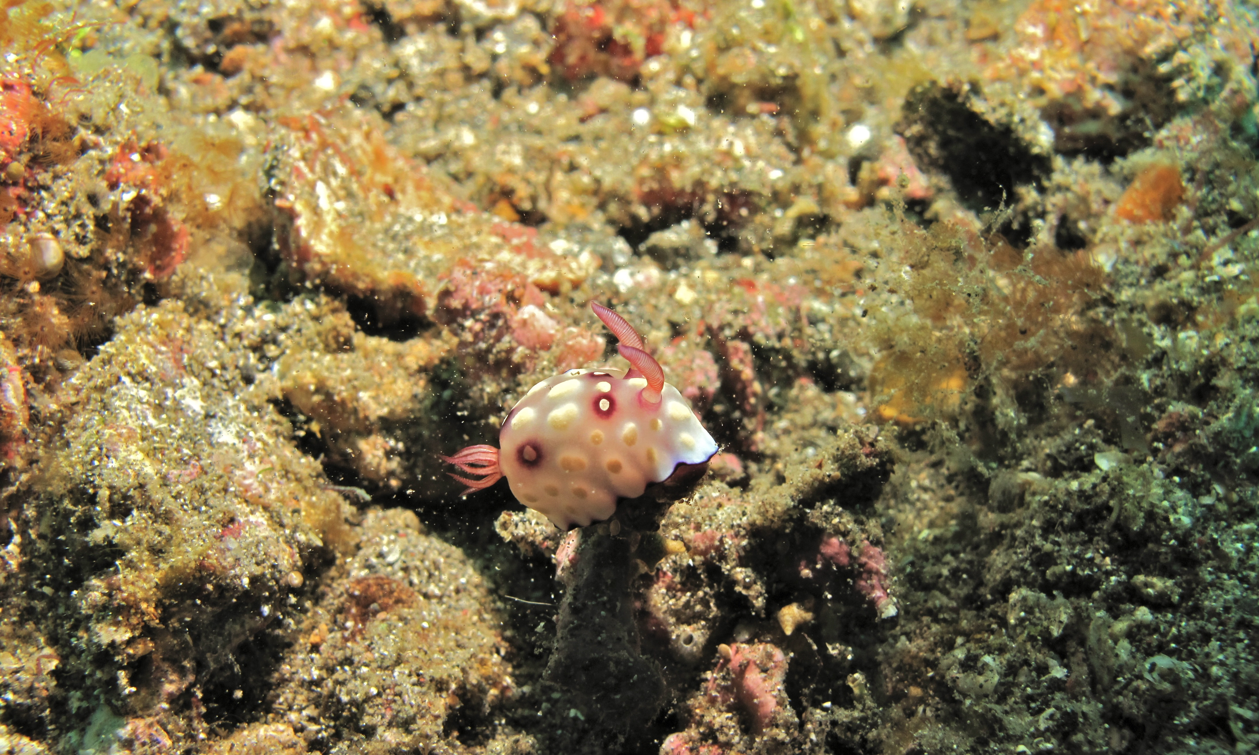 Tanjung Kubur, Lembeh Strait, Sulawesi, INDONESIA